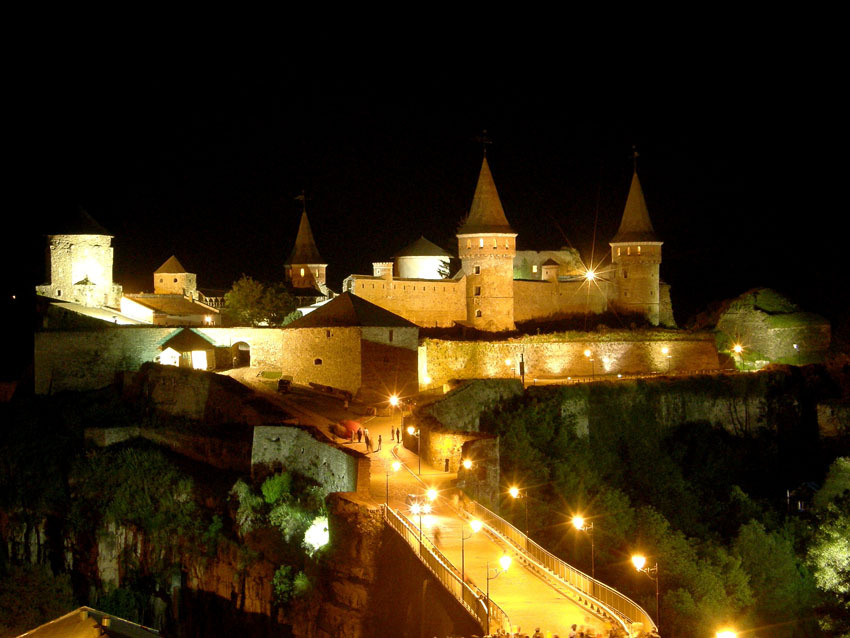 Сказочный замок... Каменец-Подольский, 2008